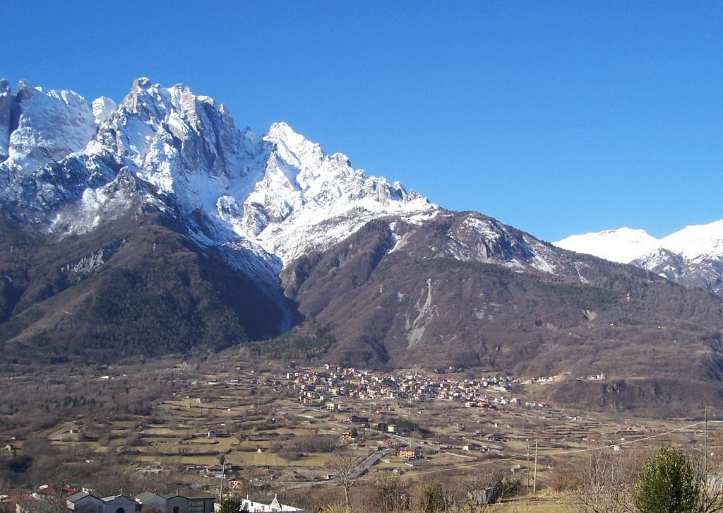 Ono san Pietro, Val Camonica, Italia